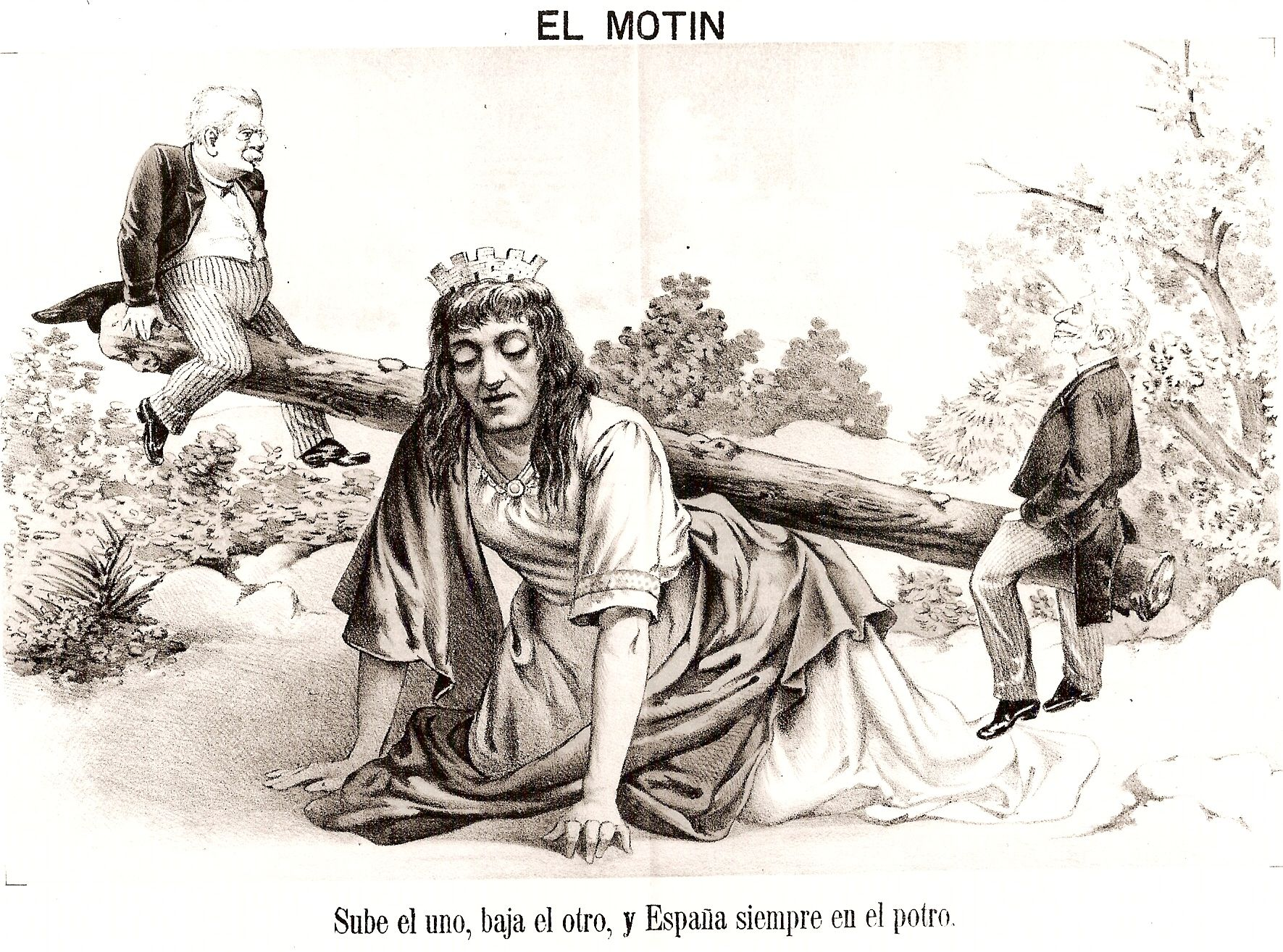 Turnismo